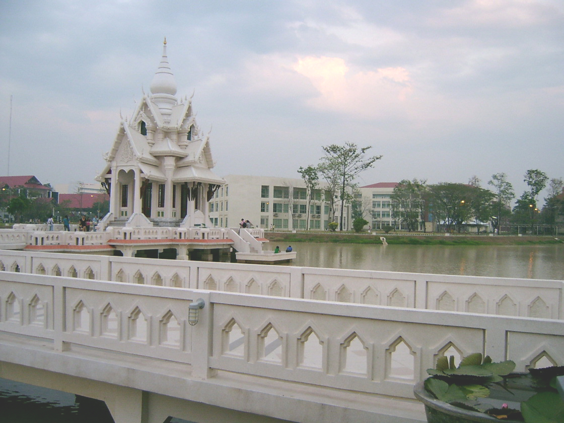 Debraratana Chapel